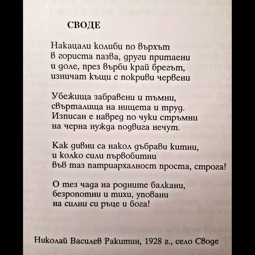 Николай Ракитин е приятел на Васил Нитов. Той е написал стихотворението през 1928г. Публикувано по-късно. Той е въодушевен от природата на селото и околностите.